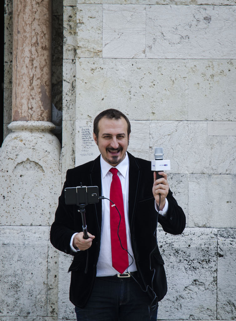 Mauro Casciari. "Sdraiati a chi? La scuola e le nuove generazioni chi le conosce, chi le capisce, chi le racconta". Festival del Giornalismo di Perugia.